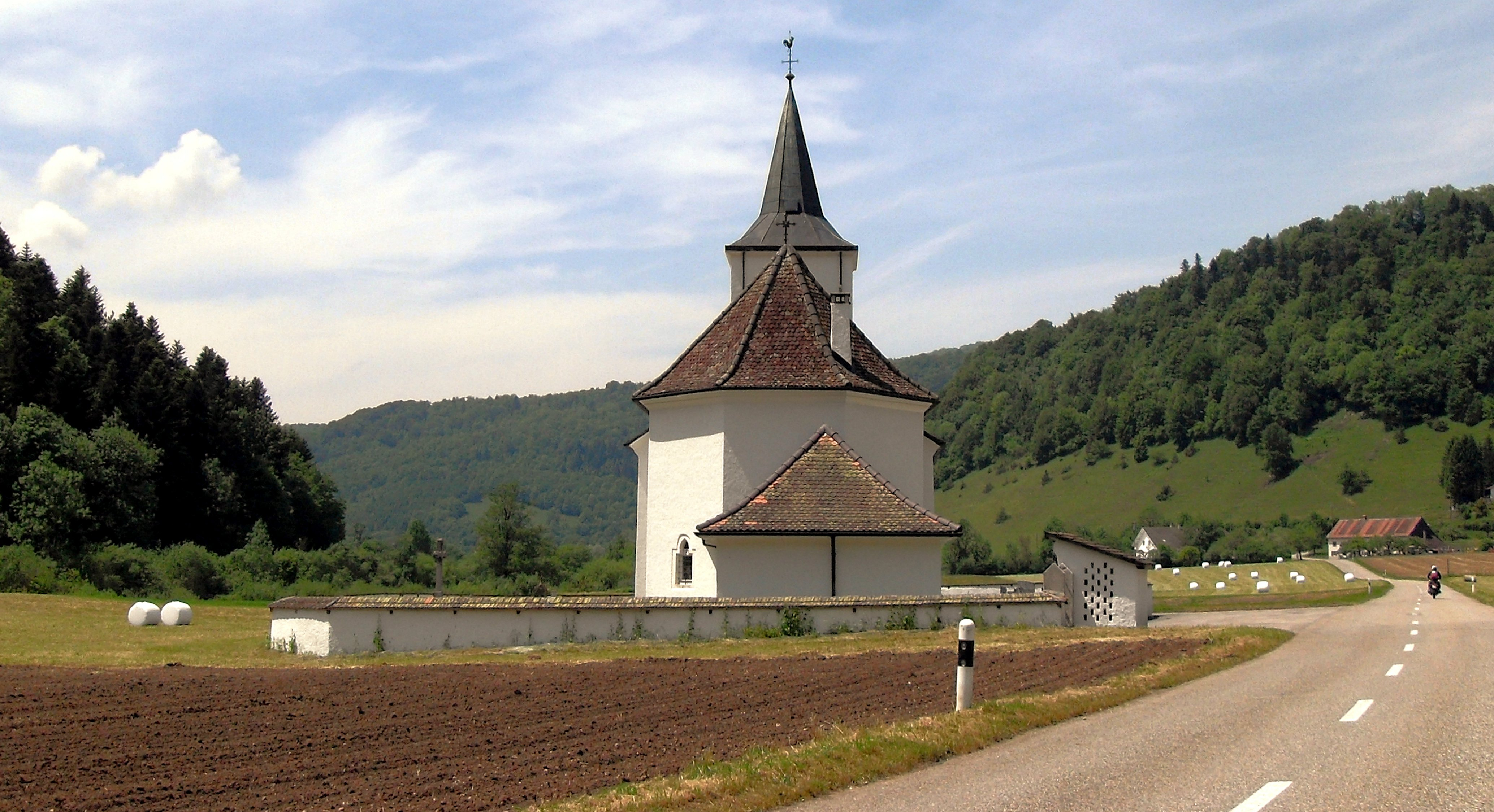 L'église Saint-Valbert d'Ocourt, commune de Clos du Doubs, Suisse